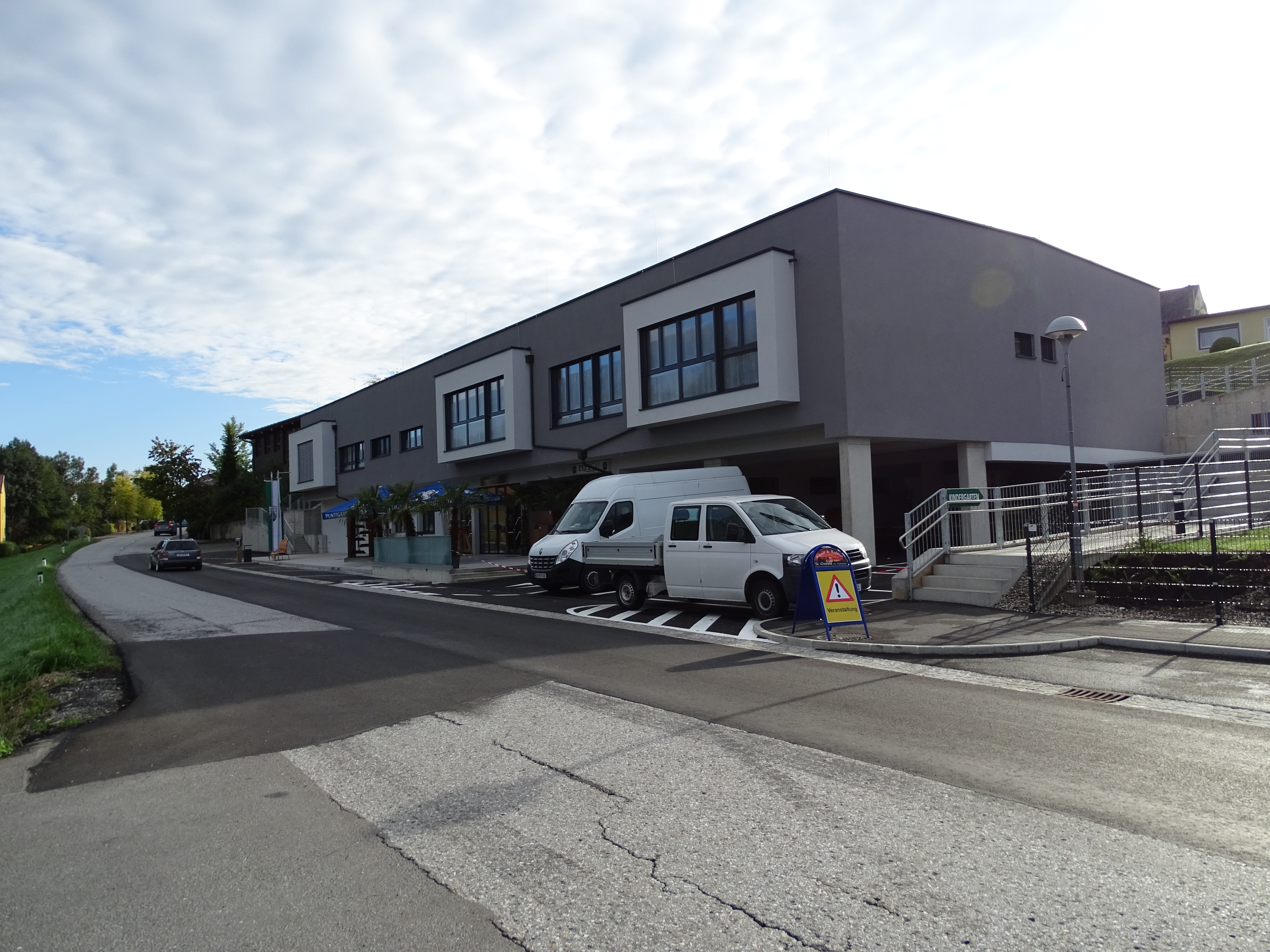 Das am 16. September 2018 neu eröffnete Gemeindezentrum von Sankt Oswald bei Plankenwarth